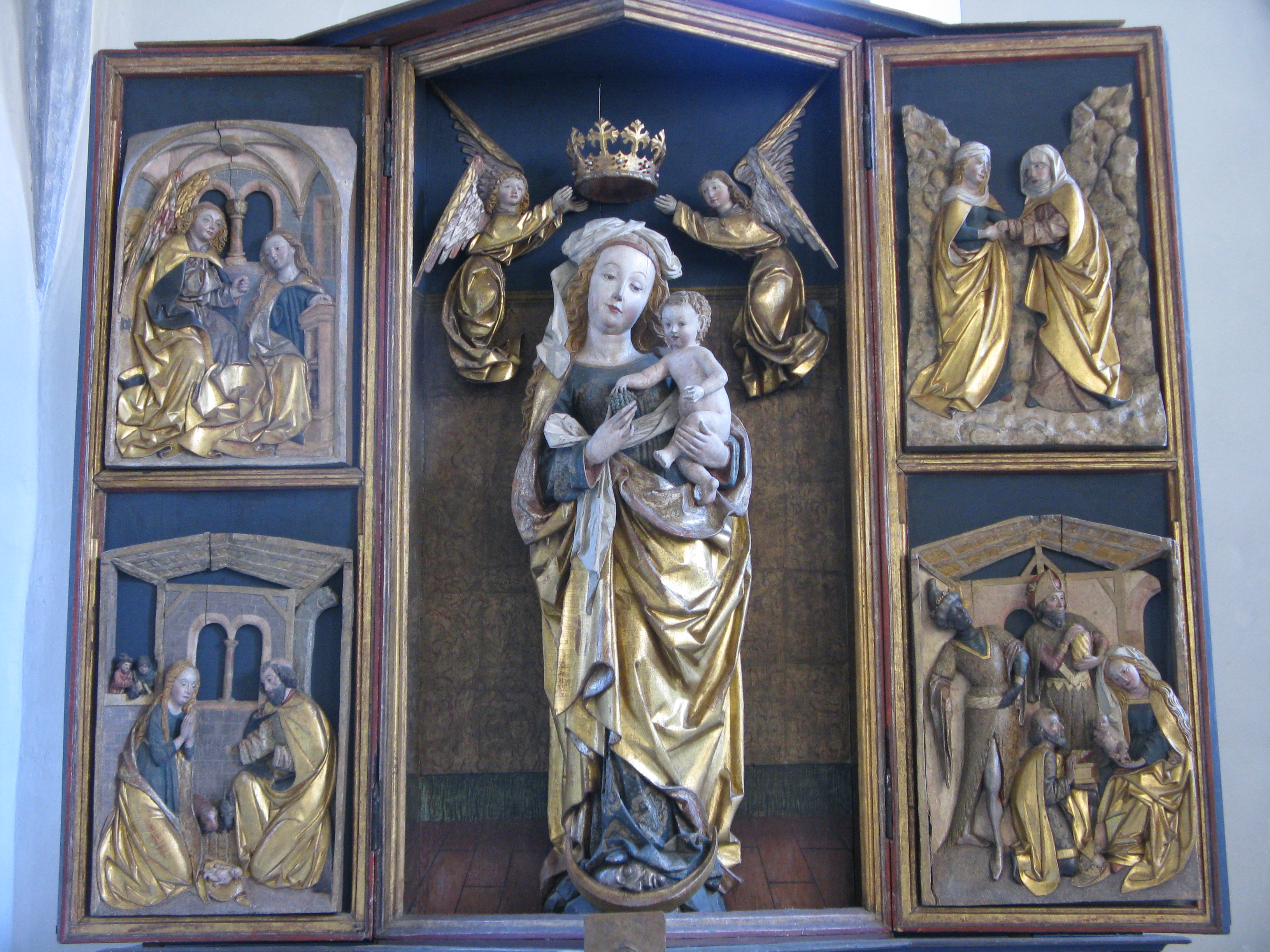 Spätmittelalterlicher Marienaltar (Flügelaltar) in St. Laurentius zu Aschbach. Auf 1470/75 datiert. In der Mitte eine Türkenmadonna (triumphierend auf einem Kopf, der auf eienr Mondsichel liegt).